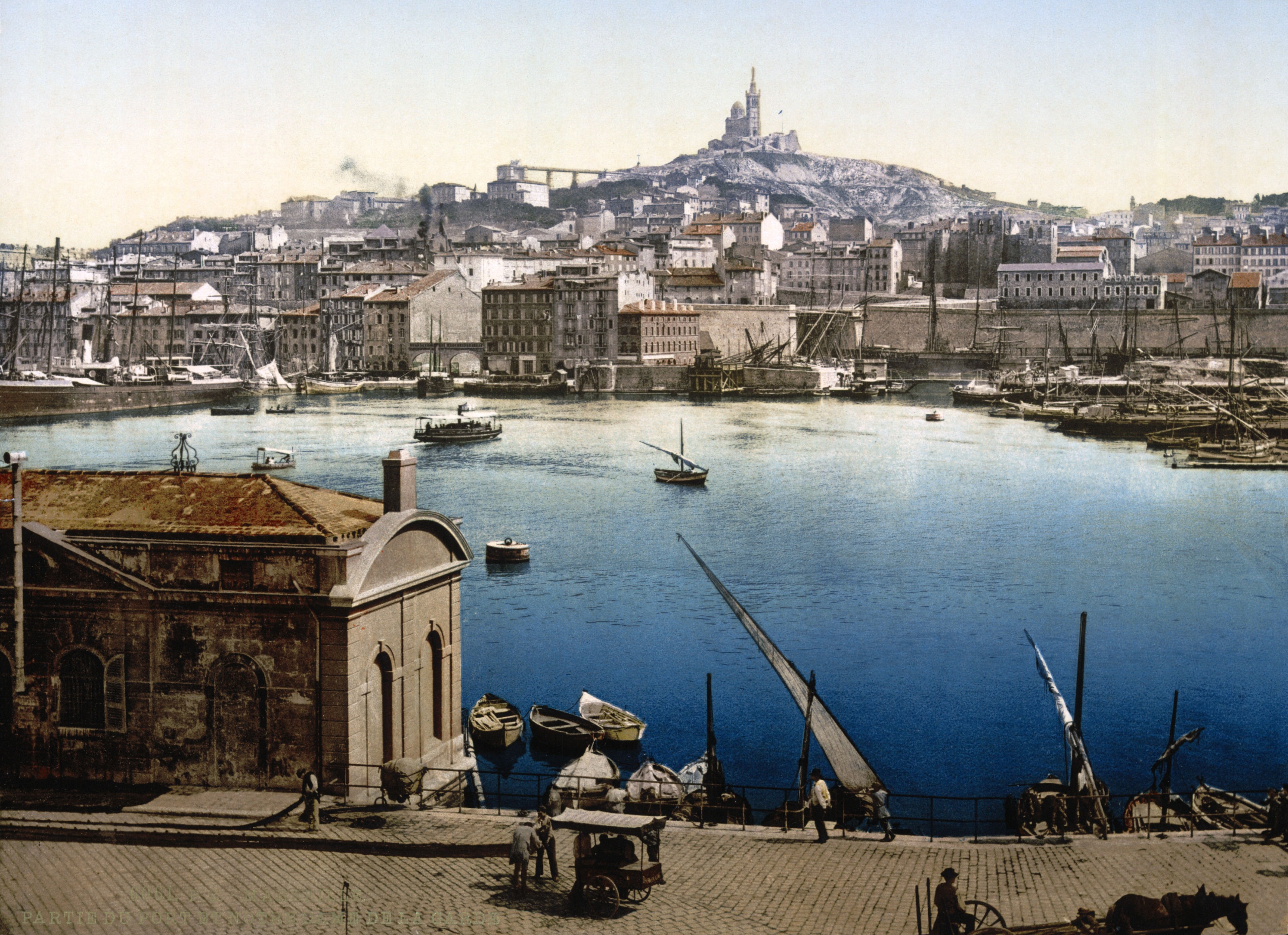 Marseille, vieux port avec vue de la vierge de la garde et de son ascenseur, vers 1900.